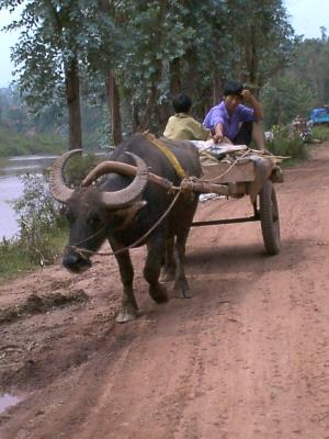 Chariot tracté par un buffle Cette photo, prise en 2000 dans le Yunnan (Chine) montre un buffle tirant une voiture portant deux paysans, sur une route de terre. L'usage de buffles pour le trait est une pratique répandue dans cette région, où la culture du riz à flanc de montagne ne permet pas une mécanisation importante.